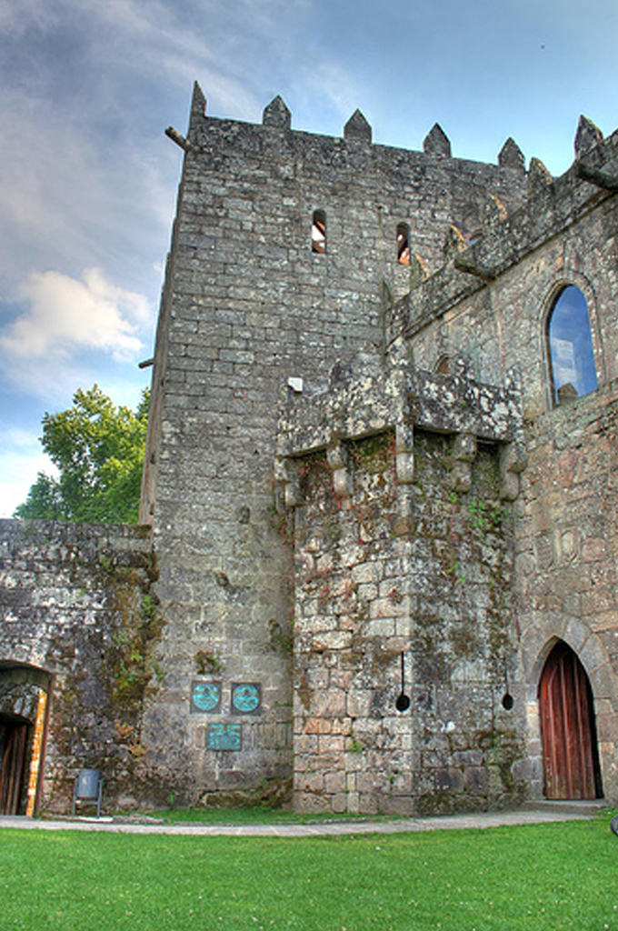 Castelo medieval de Soutomaior. Pertencente a Pedro Madruga. Galicia.